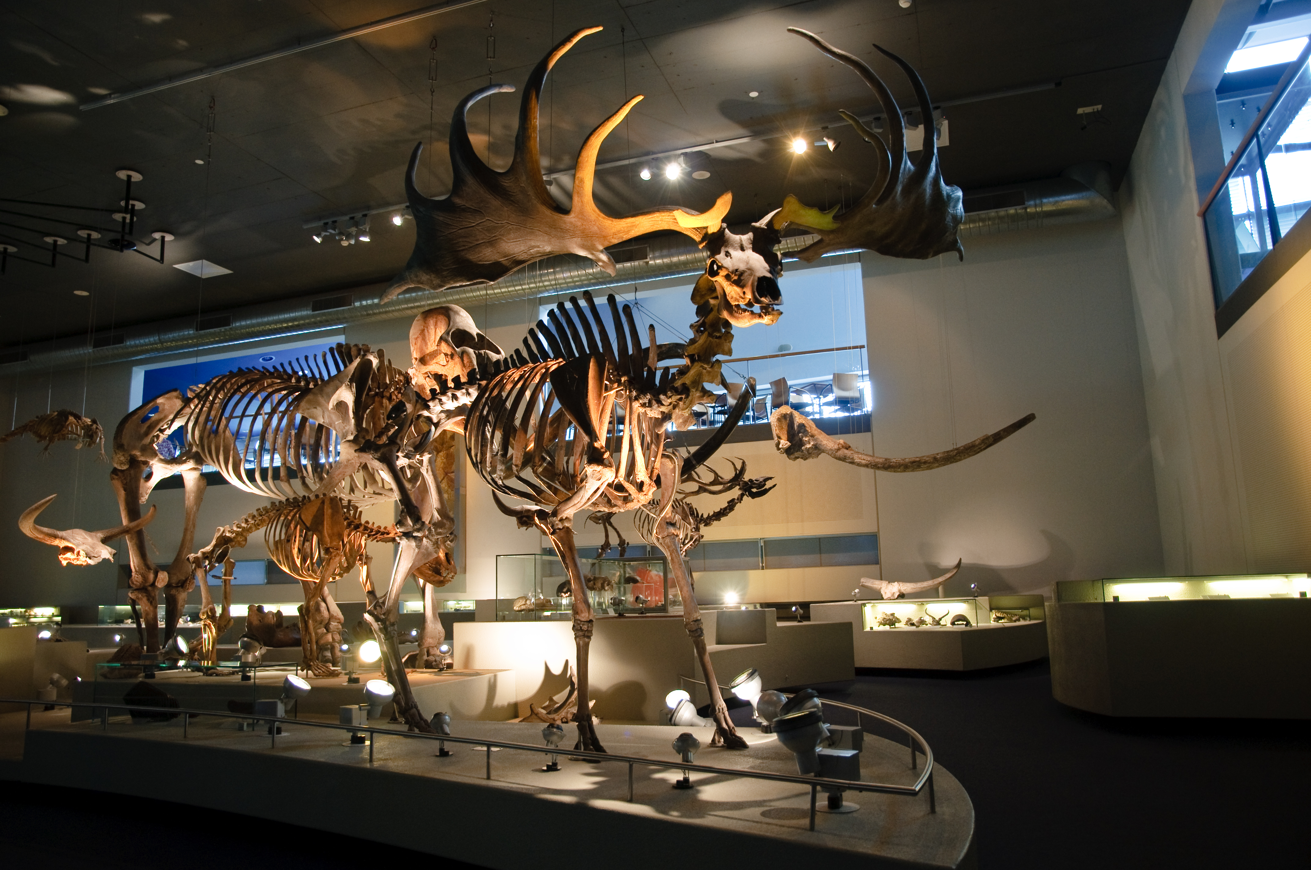 Megaloceros giganteus